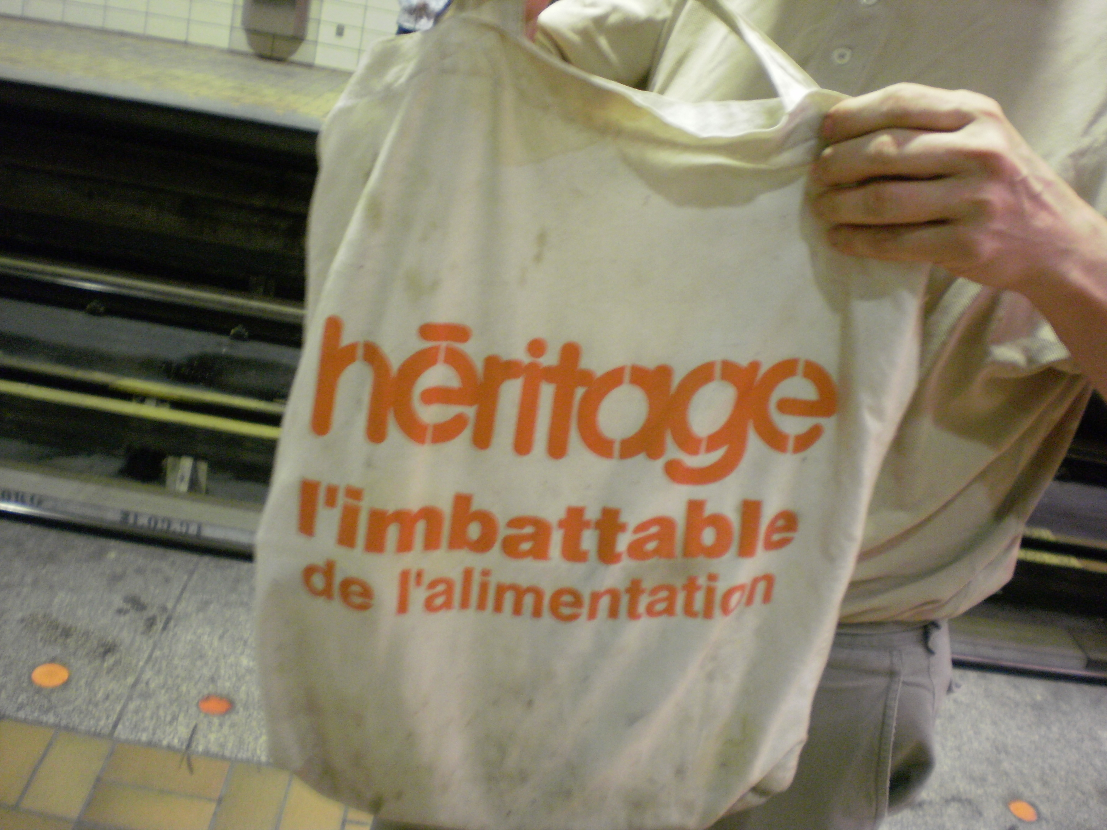 Héritage supermarket bag.